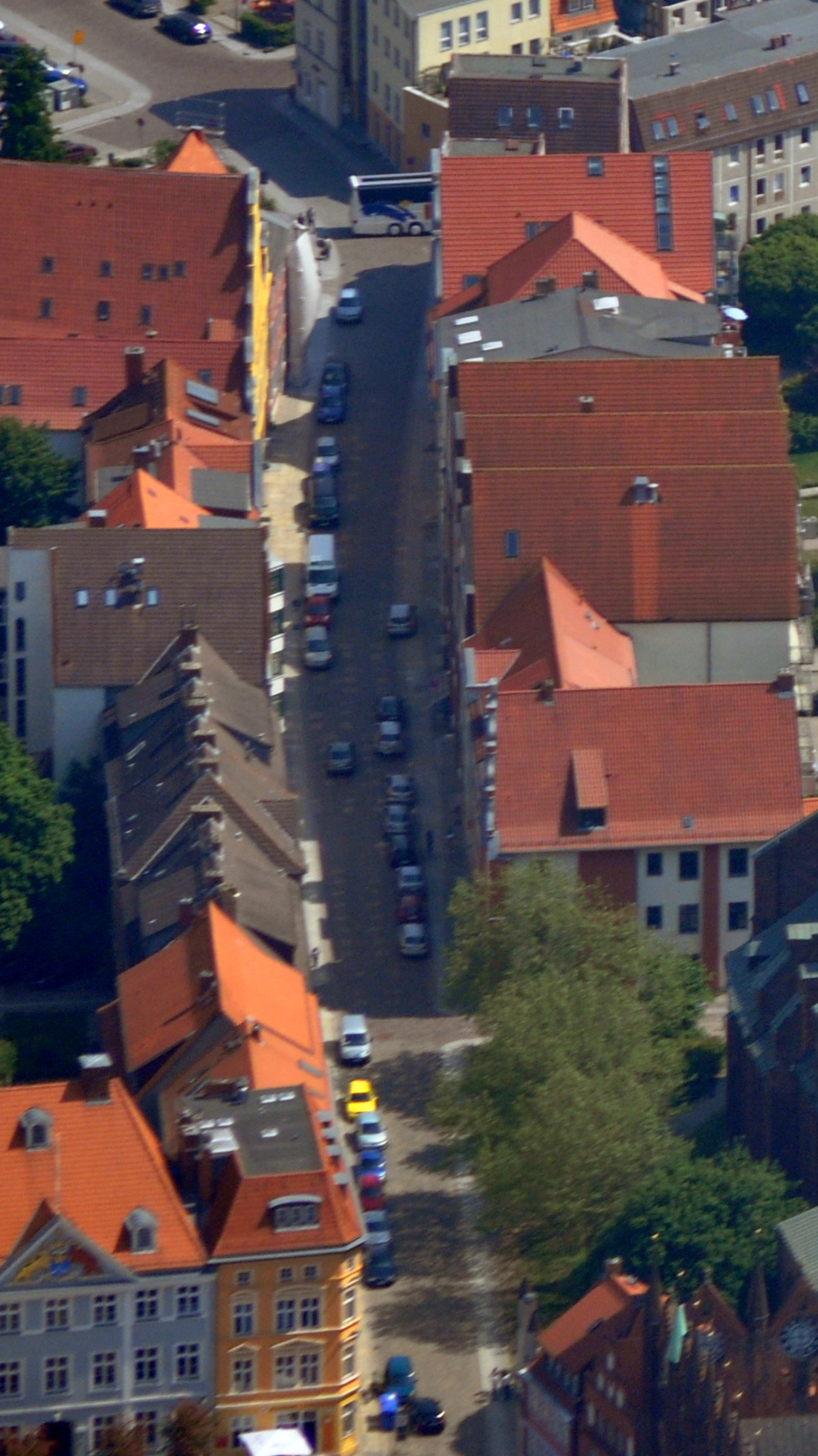 Die Bilder wurden von mir während eines einstündigen Rundflugs ab Flugplatz Güttin am 21. Mai 2011 aufgenommen. Die Bildbeschreibung steht im Dateinamen. Aufgenommen mit einer Nikon D5000 durch das Seitenfenster des Flugzeugs.